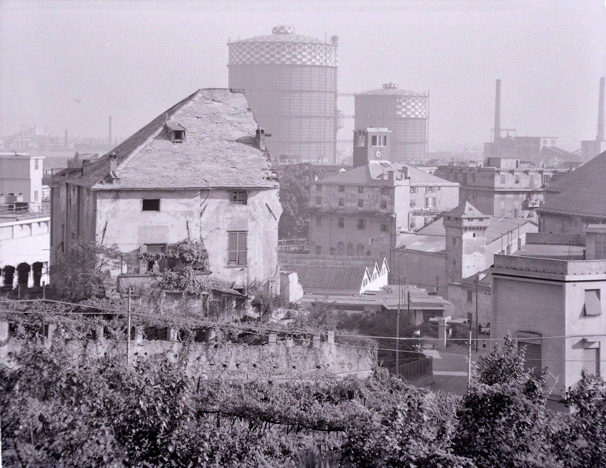 Sulla sinistra i resti di villa Doria Cevasco Dufour, pesantemente danneggiata dai bombardamenti della seconda Guerra Mondiale. Sulla destra la torre (ora isolata) che era parte dell'adiacente palazzo Spinola Muratori. This file has been extracted from another file: Paolo Monti - Servizio fotografico (Genova, 1963) - BEIC 6362160.jpg Modifiche effettuate. livelli e leggero crop. Servizio fotografico : Genova, 1963 / Paolo Monti. - Buste: 10, Fototipi: 10 : Negativo b/n, gelatina bromuro d'argento/ pellicola ; 10x12. - ((Serie costituita da 10 buste sciolte di negativi identificati con i nn.: 7342, 7343, 7344, 7348, 7349, 7350, 7351, 7352, 7353, 7357. - Su agenda denominata "R 1 - Monti/ 1 aprile 1963 - 6 giugno 1964/ 6000-8193" in corrispondenza dell'indicazione della suddetta serie appunto manoscritto: "Villa modificata con due corpi laterali aggiunti". - Possibili sottoserie:. - 7342-7343:. - 7348-7349. - Il negativo identificato con il numero 46397 è stato realizzato per Zodiac. - Occasione: Documentazione per la pubblicazione: Italia Nostra (a cura di), "Le ville genovesi", catalogo della mostra, Genova 1962, Genova, Comune di Genova, 1967. - Fonte: Rubrica di Paolo Monti: Archivio fino 1-4-1961/ 31-3-1963 (1961-1963), presso Archivio Paolo Monti. - Fonte: Agenda di Paolo Monti: R 1 - Monti/ 1 aprile 1963 - 6 giugno 1964/ 6000-8193 (1963-1964), presso Archivio Paolo Monti. - Fonte: Monografia di Italia Nostra (a cura di): Le ville genovesi, catalogo della mostra, Genova 1962, Genova, Comune di Genova (1967). - Fonte: Lettera di Paolo Monti: I. Carteggi/ Genova - Enrico (1963-1966), presso Archivio Paolo Monti. Camicia con documenti dattiloscritti e manoscritti vari relativi al lavoro eseguito per Italia Nostra: preventivi, lettere, inventari